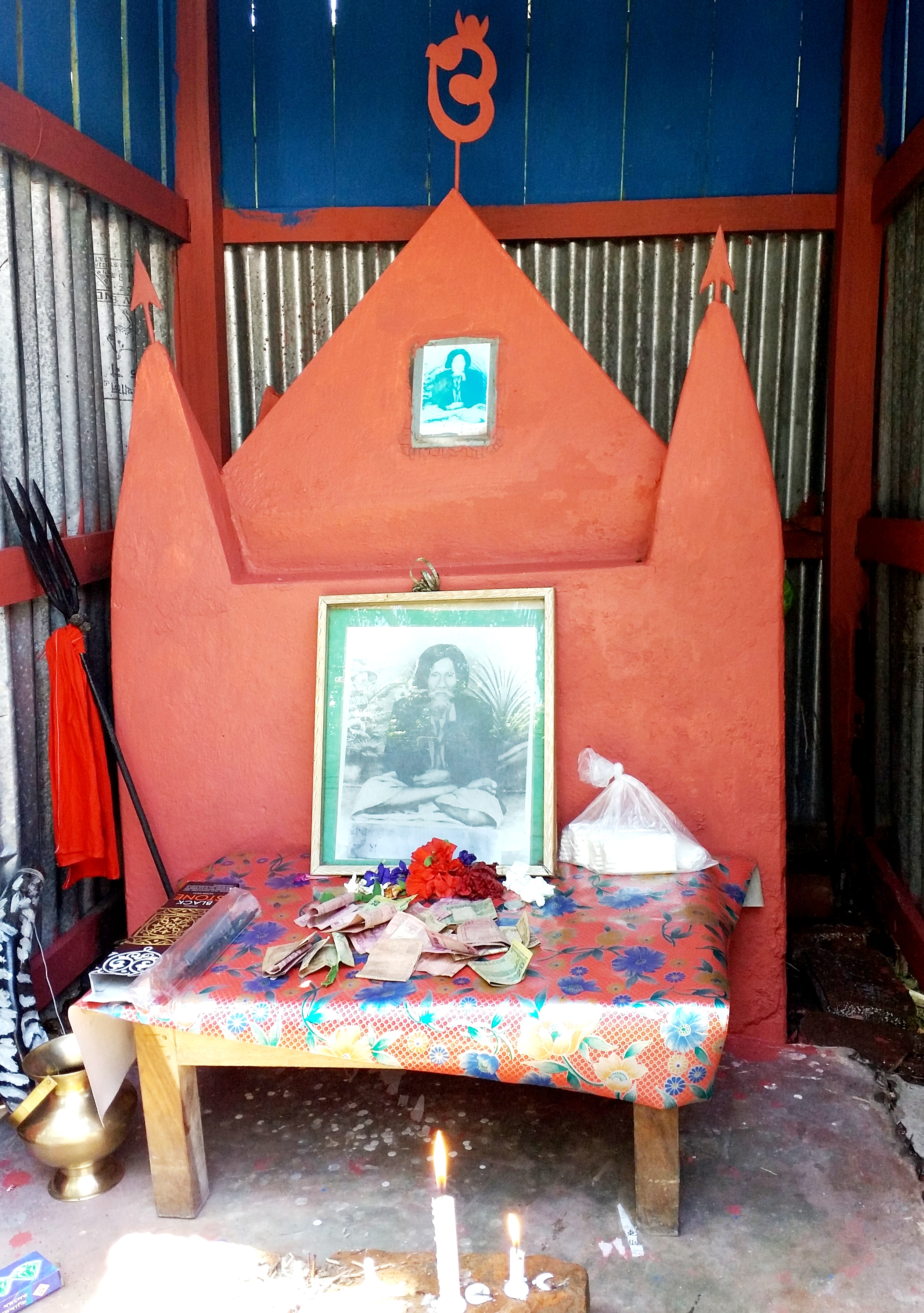 শ্রীমৎ খুসী কৃষ্ণ ত্রিপুরা বলংরায় সাধুর সমাধি